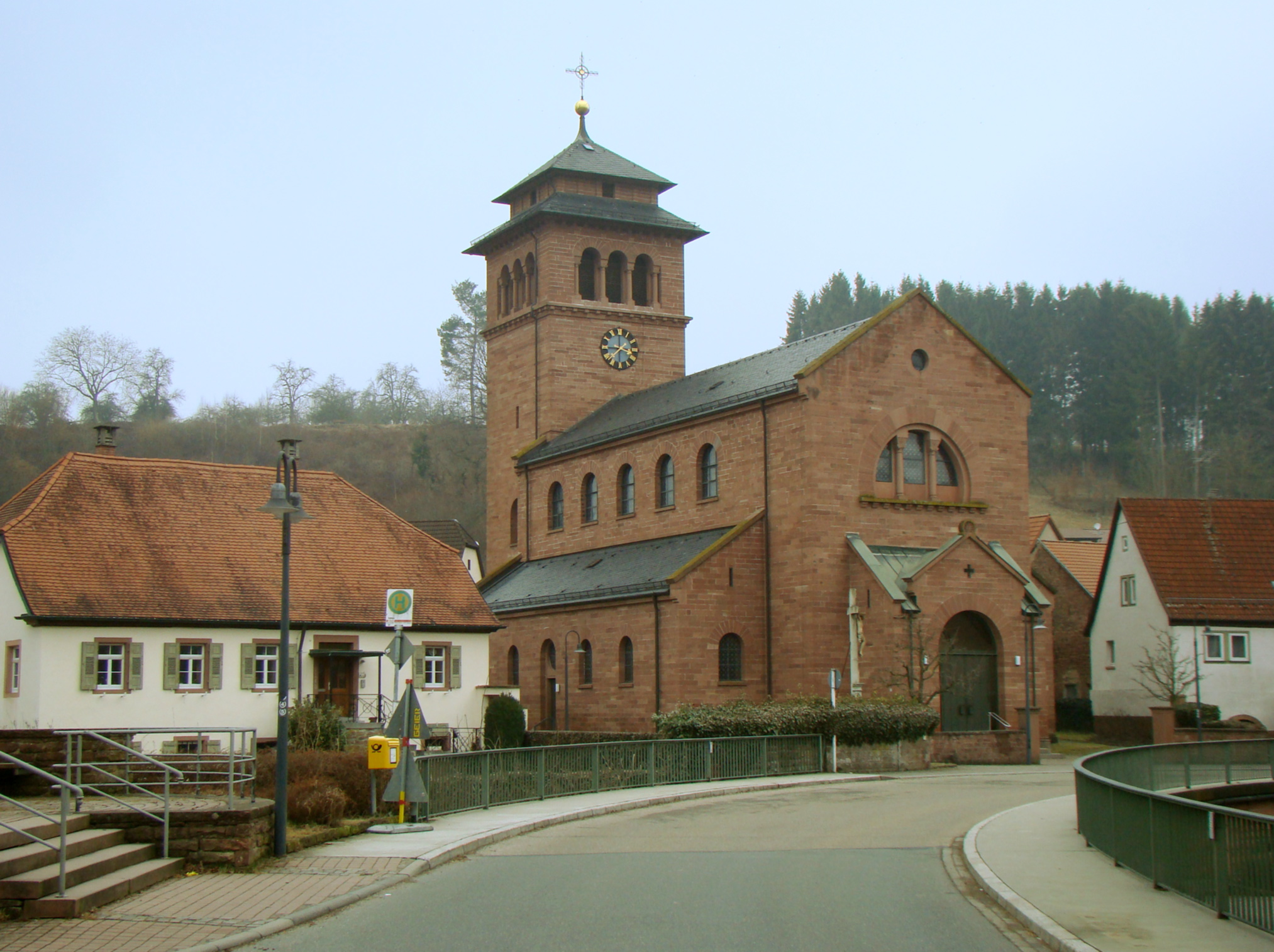 Kath. Kirche St. Georg und Pfarrhaus in Elztal-Rittersbach